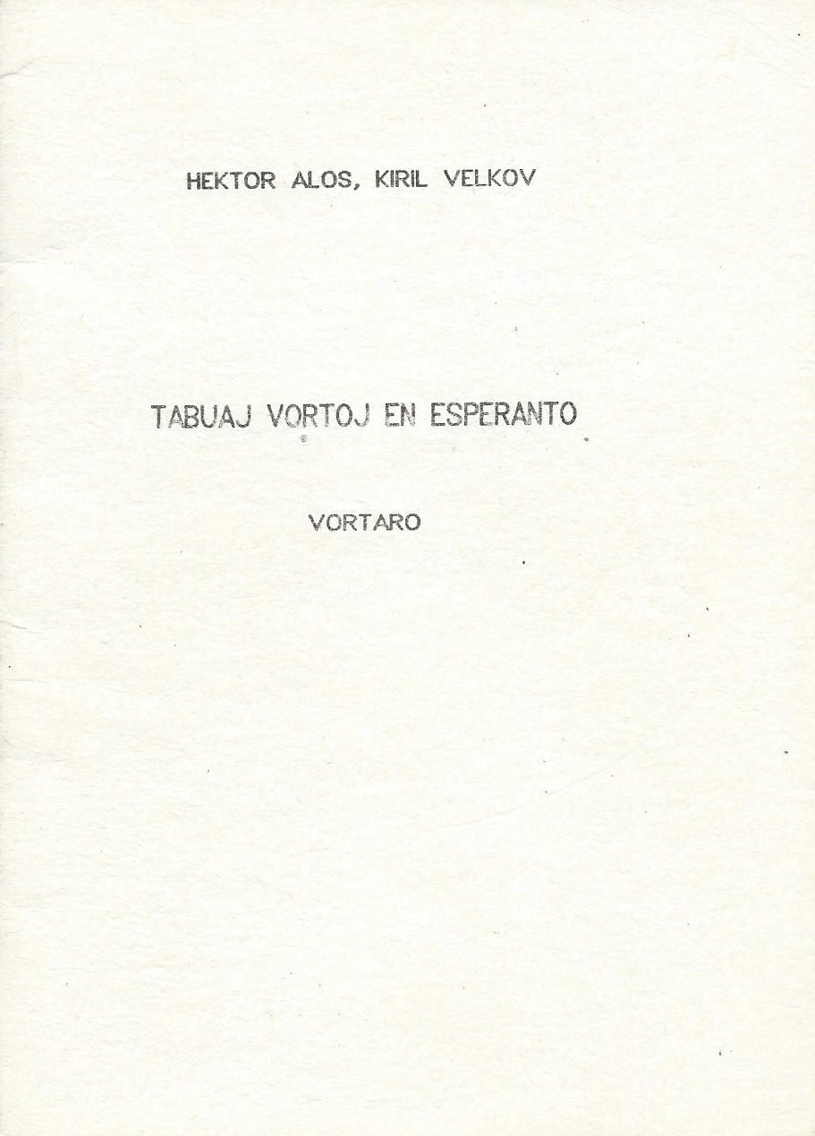 librokovrilo de "Tabuaj Vortoj en Esperanto", 1991